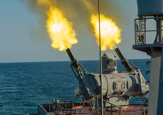 Пальма - Кубок Каспия – 2015